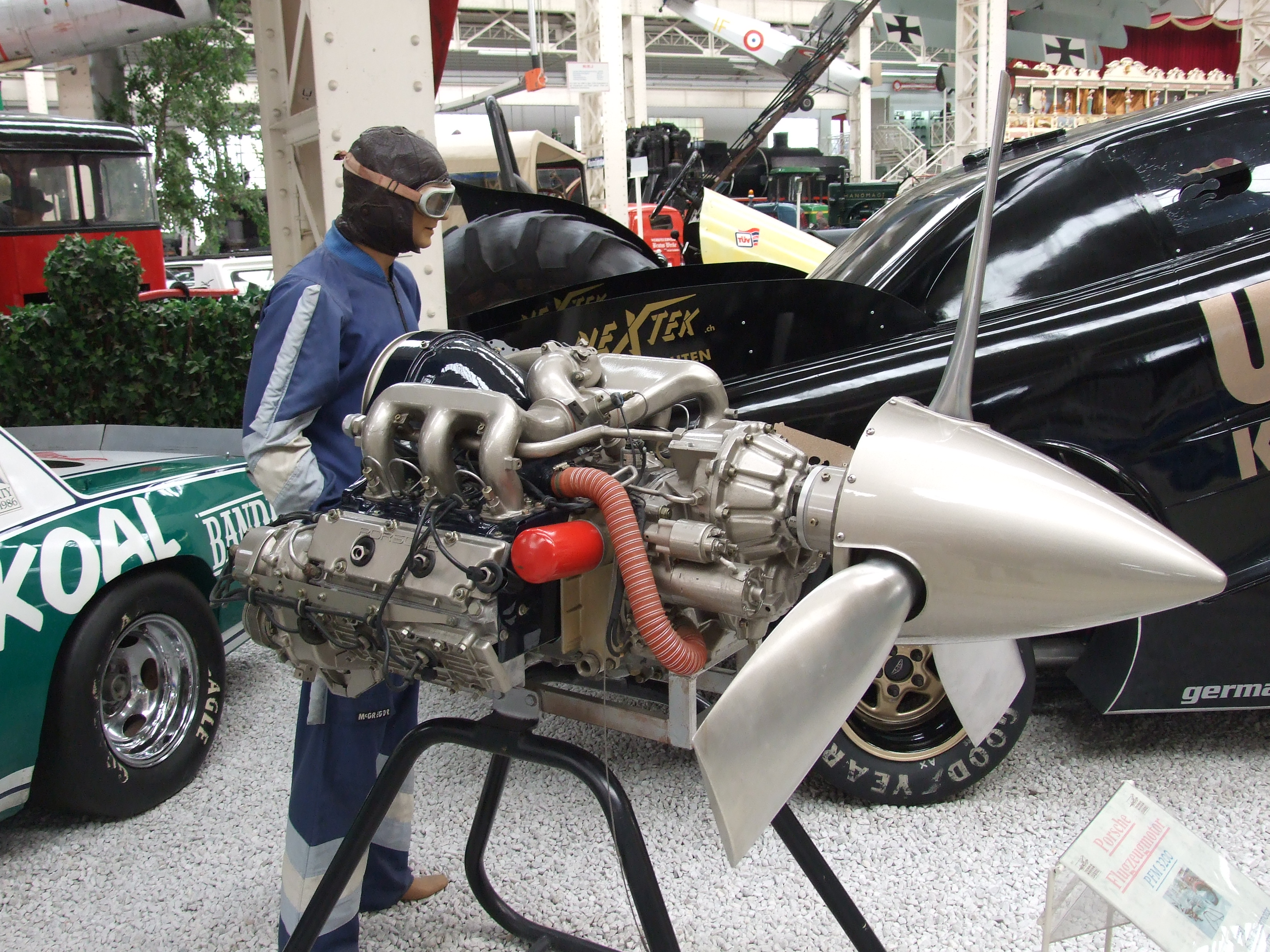 Porsche PFM 3200 aircraft engine in Technik Museum Speyer